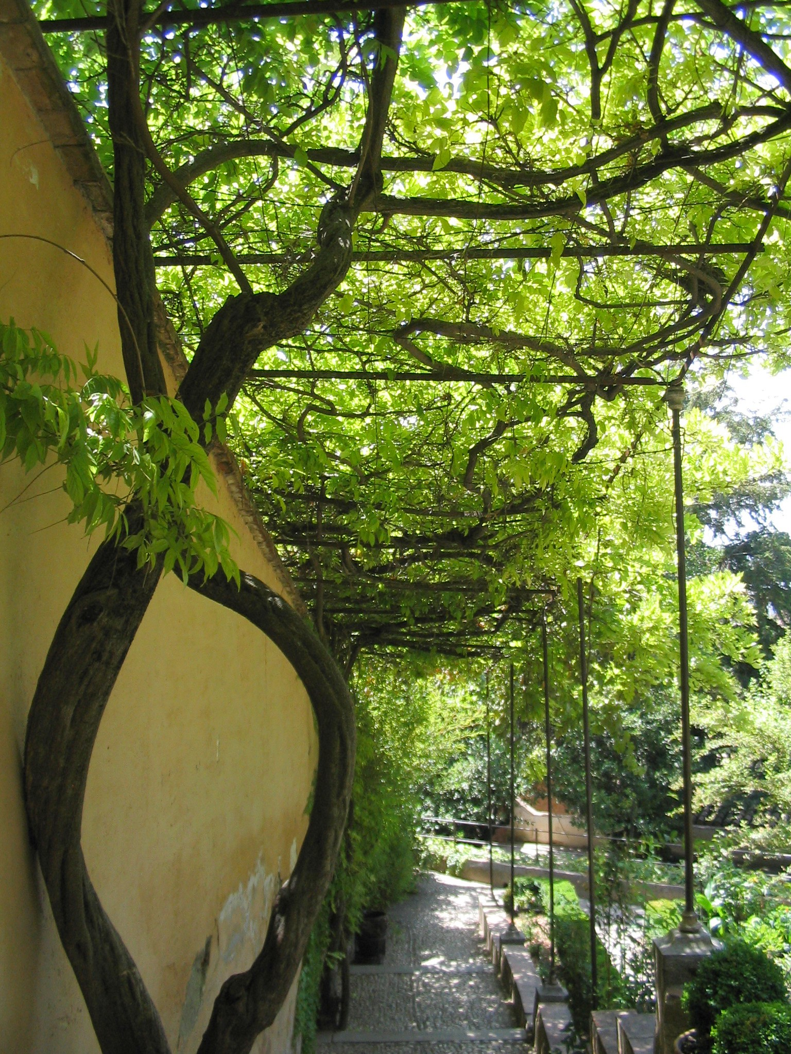 Allée d’ombre, Palais du Generalife, Alhambra de Grenade Espagne